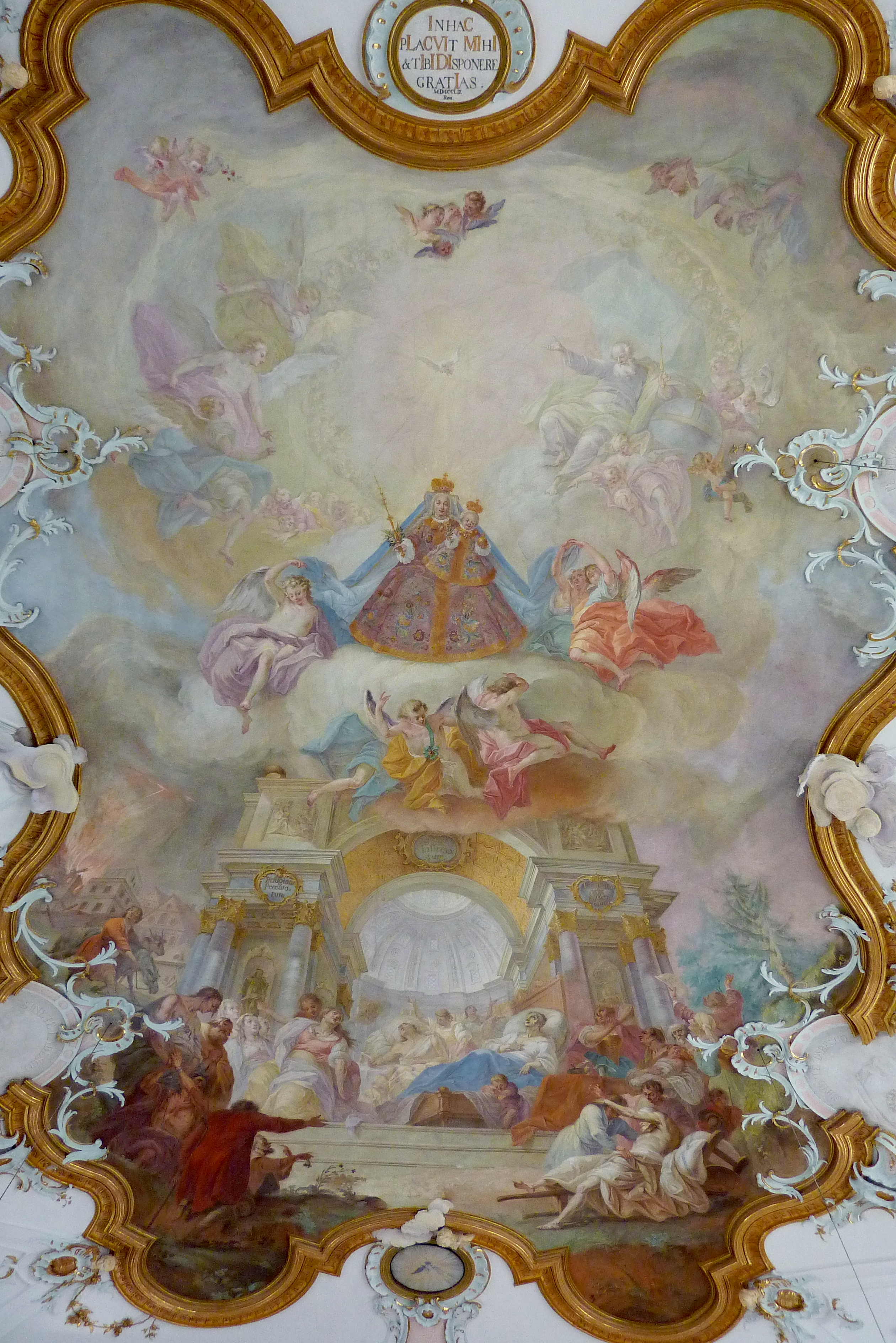 Katholische Pfarr- und Wallfahrtskirche Mariä Heimsuchung in Gottmannshofen, einem Stadtteil von Wertingen im Landkreis Dillingen an der Donau (Bayern), Deckenfresko von Johann Baptist Enderle (1725–1798), Stuck von Franz Xaver Feuchtmayer d. Älteren (1698–1763). Darstellung: Maria als Himmelskönigin, die ihren Schutzmantel ausbreitet über Bettler und Kranke, die sich unter einem monumentalen Triumpfbogen versammeln. Signatur: „Enderle pinxit“ (Enderle hat es gemalt). Zwischen dem Deckenfresko des Langhauses und dem Fresko über der Orgelempore befindet sich ein Chronogramm mit der Inschrift: „In haC pLaCVIt MIhI et tIbI DIsponere GratIas“ (An diesem Ort ha es mir und dir gefallen, Gnaden zu verteilen). Die Großbuchstaben entsprechen römischen Ziffern und ergeben die Jahreszahl 1763 (MDCCLVIIIIIIII), das Jahr, in dem die Fresken geschaffen wurden.